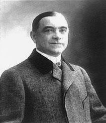 Albert Brasseur (cliché Nadar)